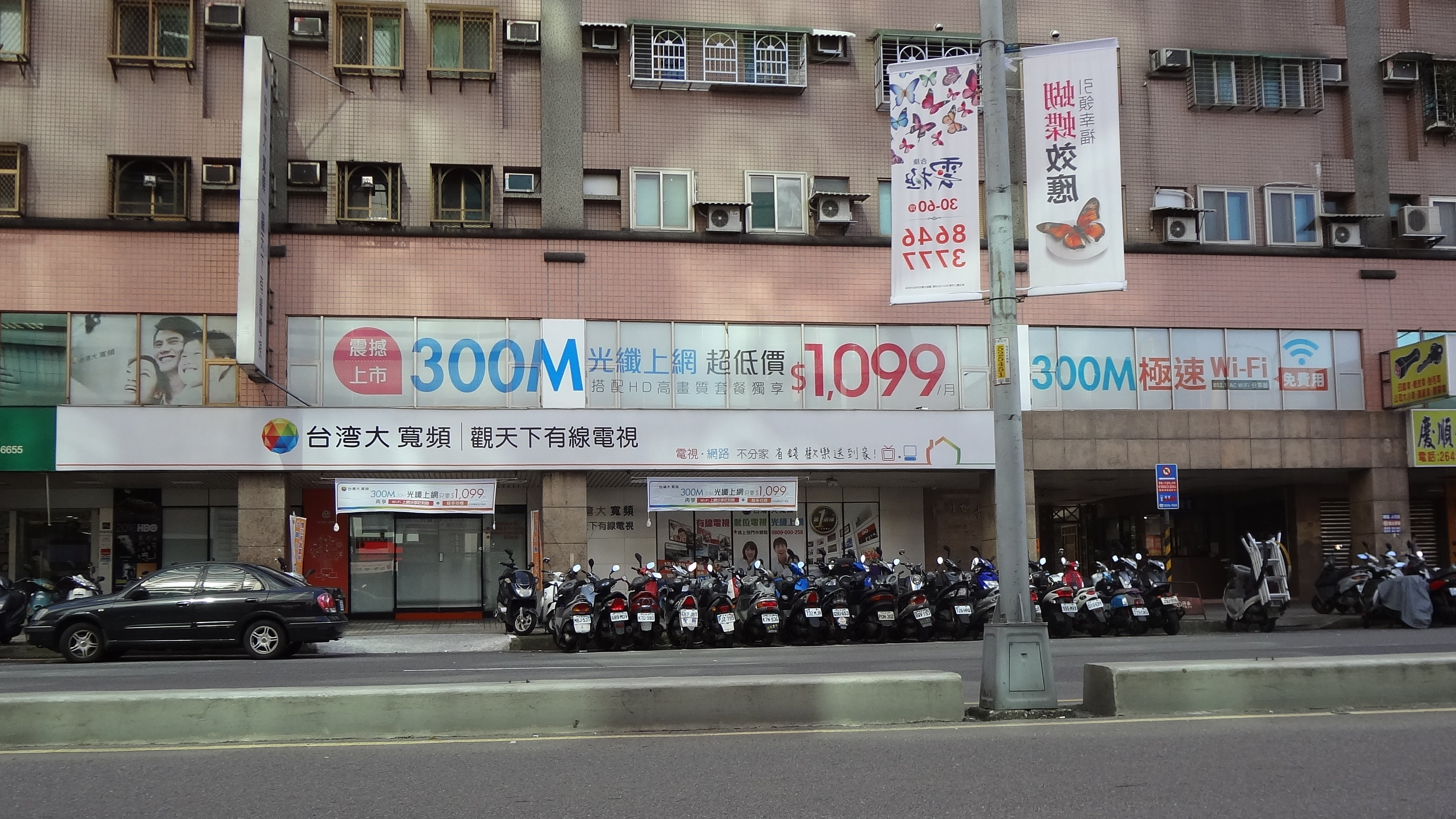 2016年9月24日的觀天下有線電視總部，位於新北市汐止區大同路二段206號1樓。